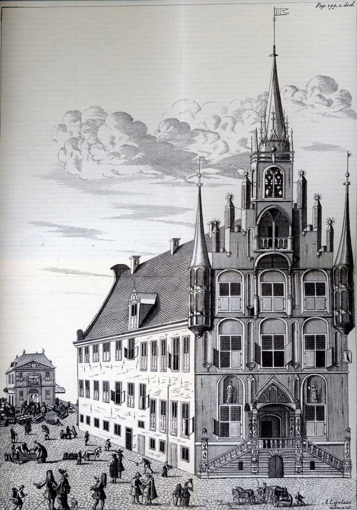 Stadhuis van Gouda